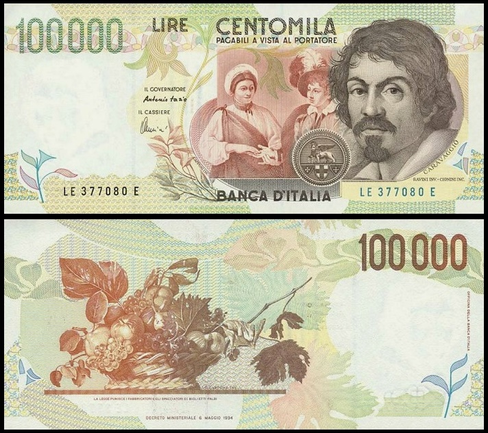 Banconota italiana dedicata a Michelangelo Merisi da Caravaggio del valore nominale di 100.000 Lire emessa dal 1994 al 2001.